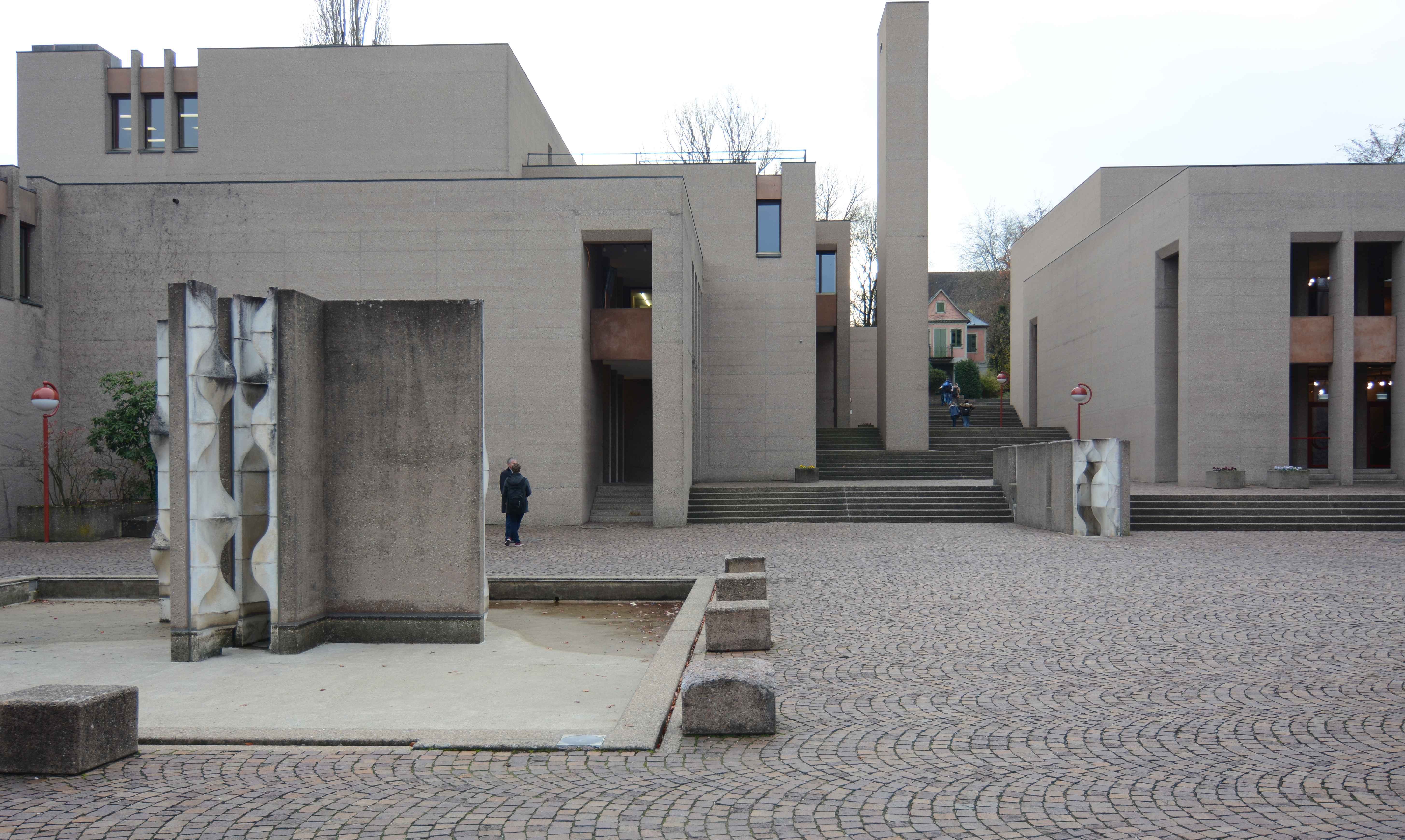 Kantonales Lehrerseminar Kreuzlingen (heute Pädagogische Maturitätsschule Kreuzlingen), Kreuzlingen, 1965–72. Schulplatz. Brunnenskulpturen: Bernard Schorderet. Architekten: Rudolf und Esther Guyer